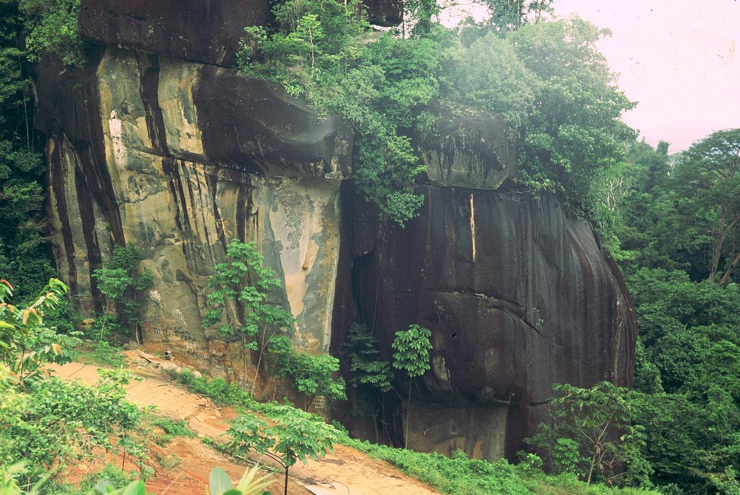 Formación rocosa (arenisca) conocida como la Piedra de la Virgen, al inicio del tramo identificado como La Escalera en la carretera que va desde El Dorado a Santa Elena de Uairén, en La Gran Sabana (Estado Bolívar, Venezuela). También pueden verse junto a la carretera, varios ejemplares de yagrumo (Cecropia peltata).